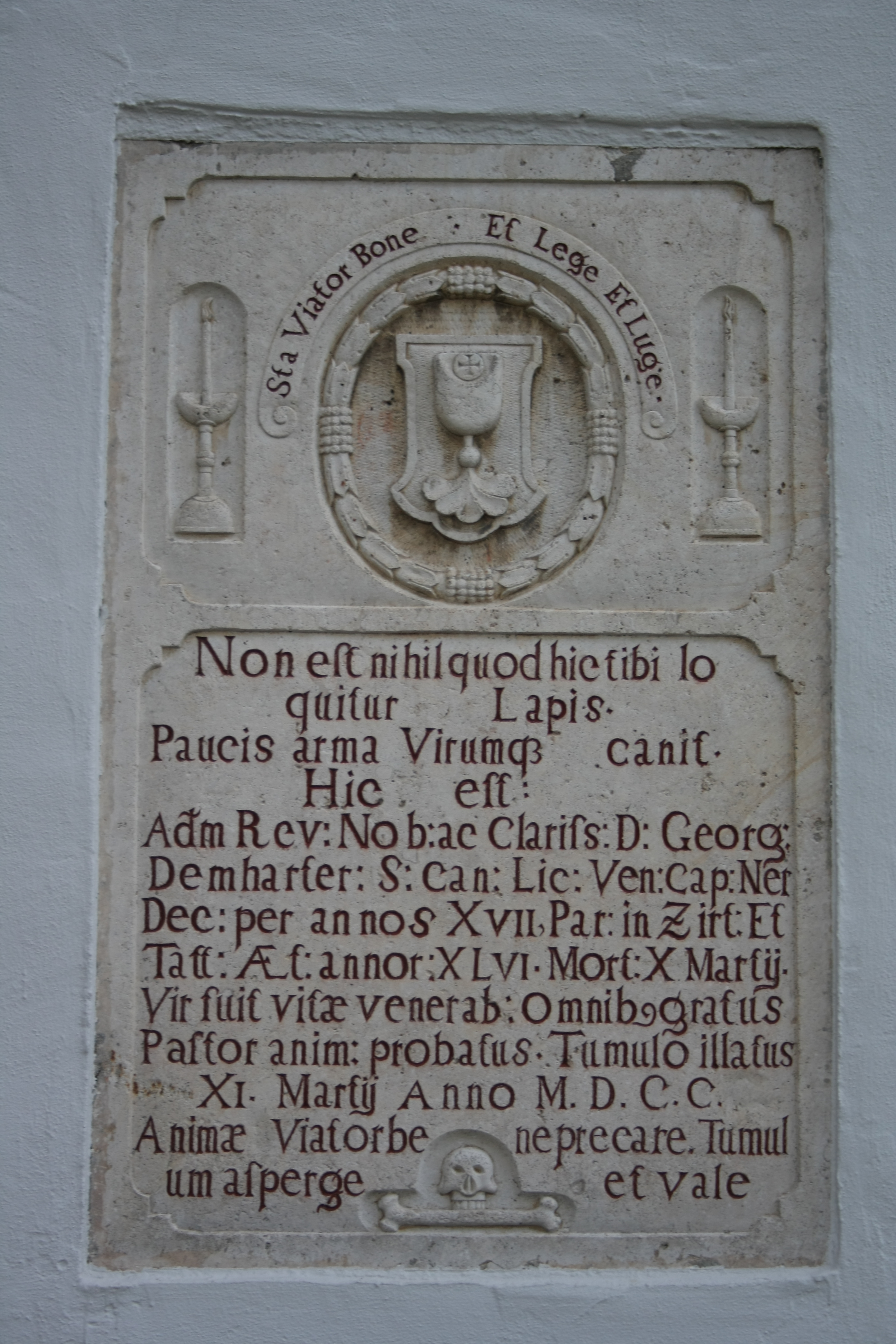 Katholische Pfarrkirche St. Veronika in Ziertheim (Landkreis Dillingen an der Donau/Bayern), Grabplatte Dekan Georg Demharter von 1700